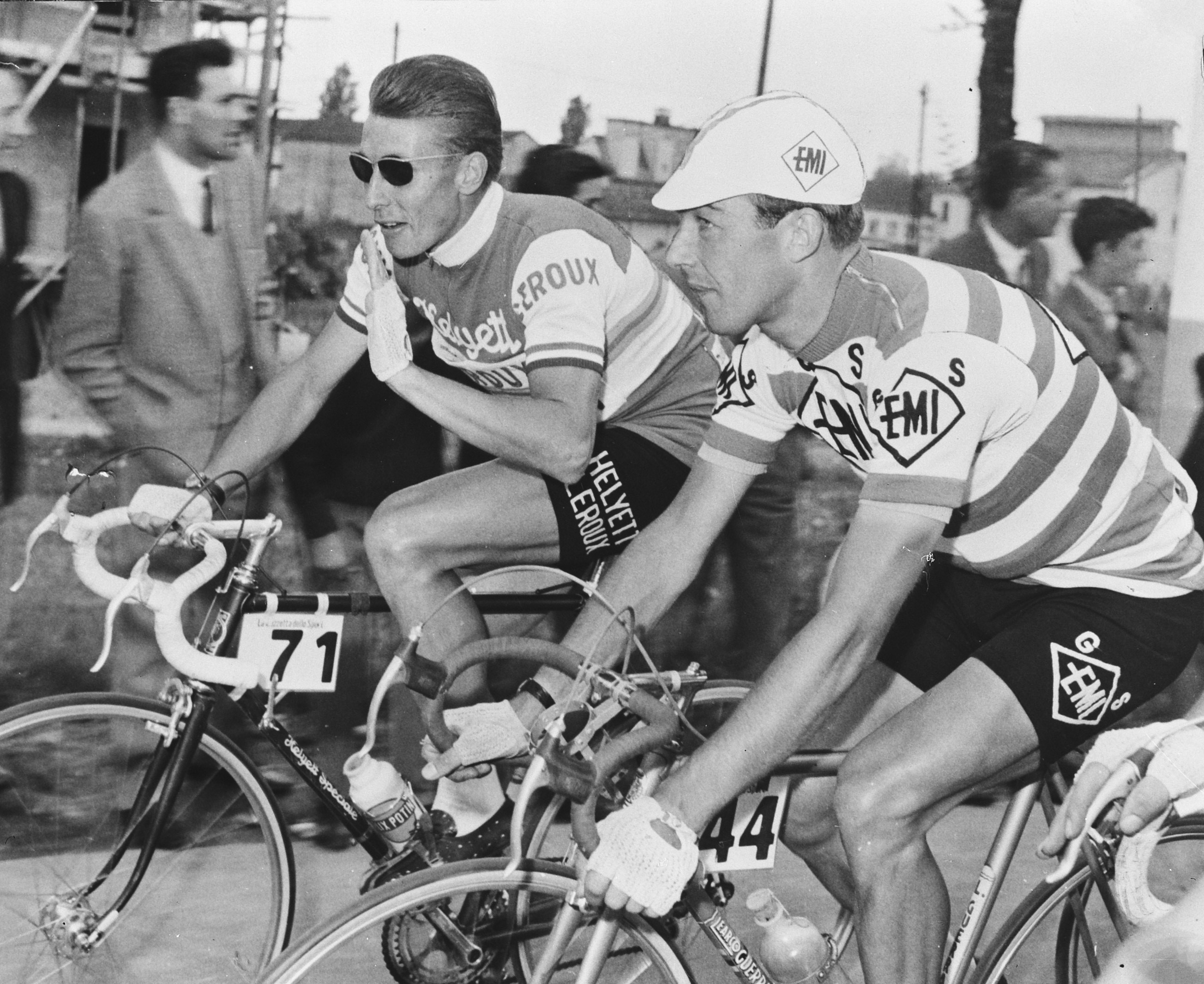 42ste ronde van Italie. Anquetil en Gaul